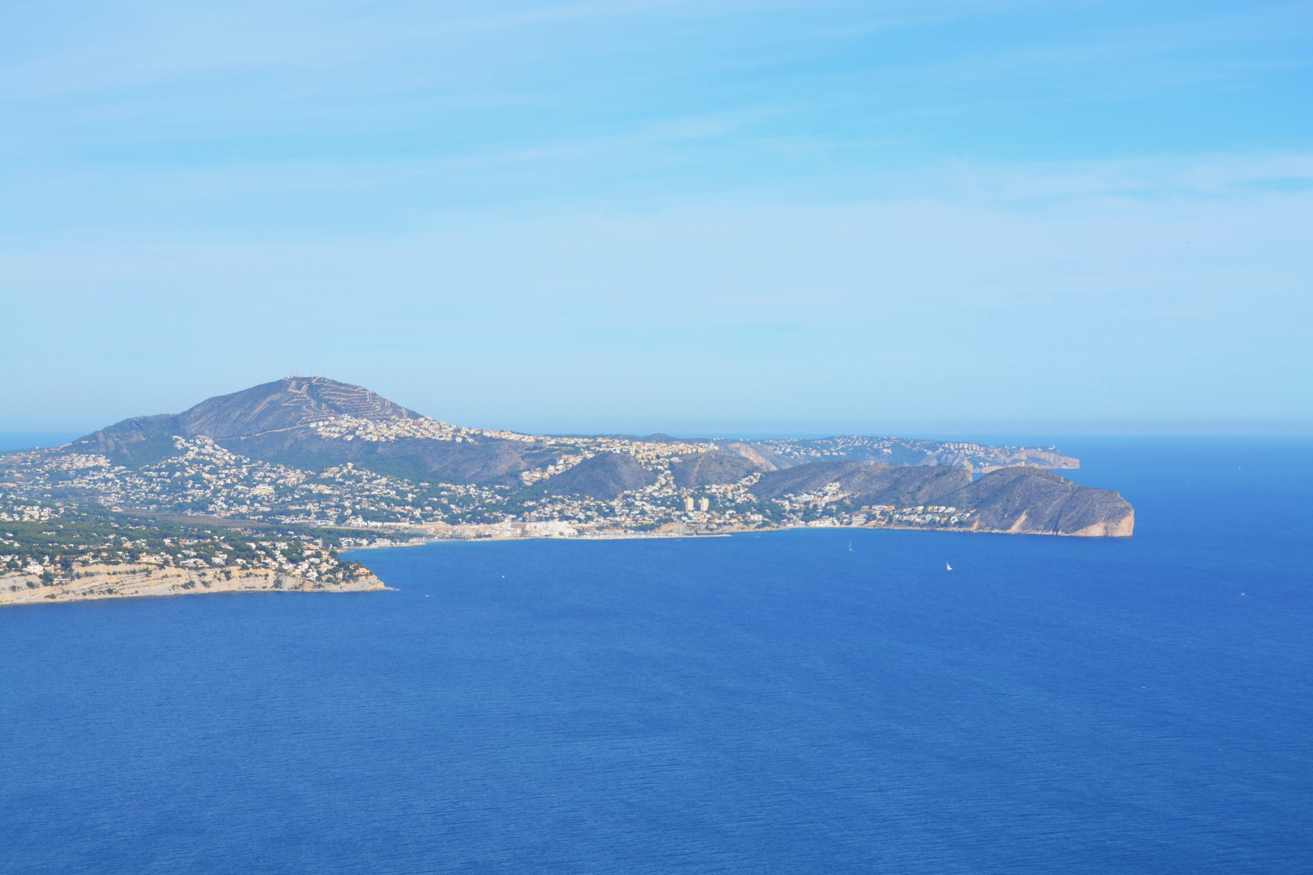 Vista cap al Puig Llorença, el cap d'Or i el cap de la Nau des del Penyal d'Ifac.